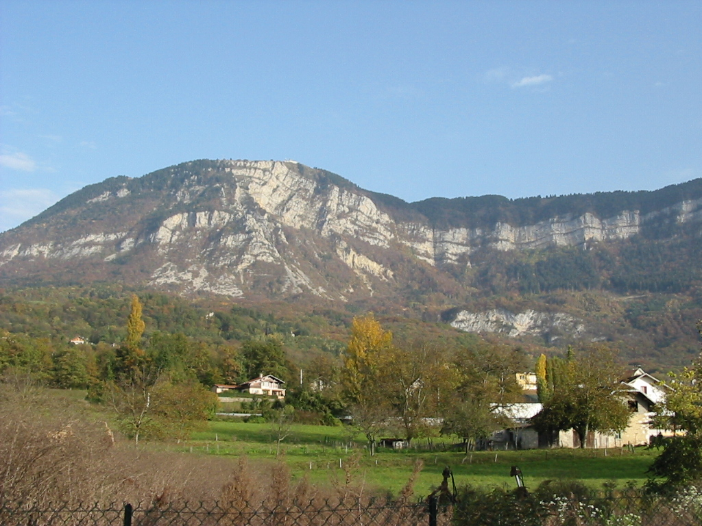 Le mont Revard Sommet des Alpes françaises, dans le massif des Bauges Vue prise d'Aix-les-Bains Photographie personnelle, prise le 27 octobre 2006 Copyright © Christian Amet